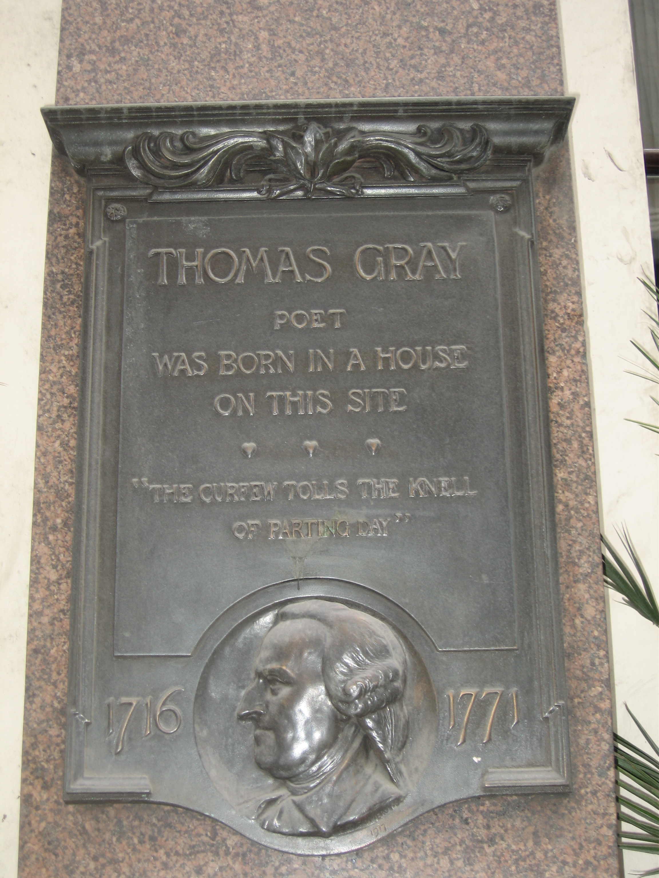 Tablica pamiatkowa Thomas_Gray